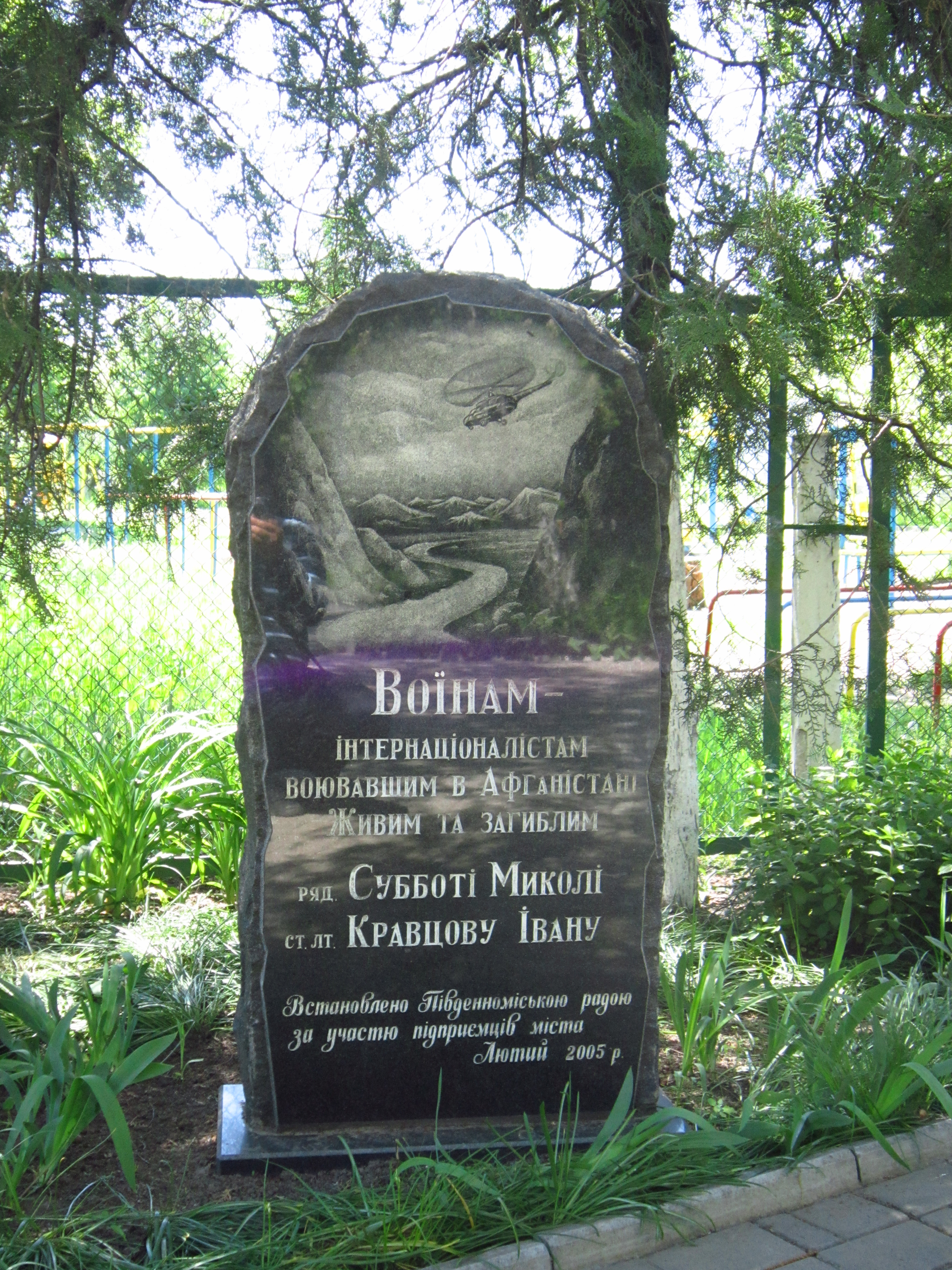 Монумент воїнам-інтернаціоналістам у м. Південне, Харківська область